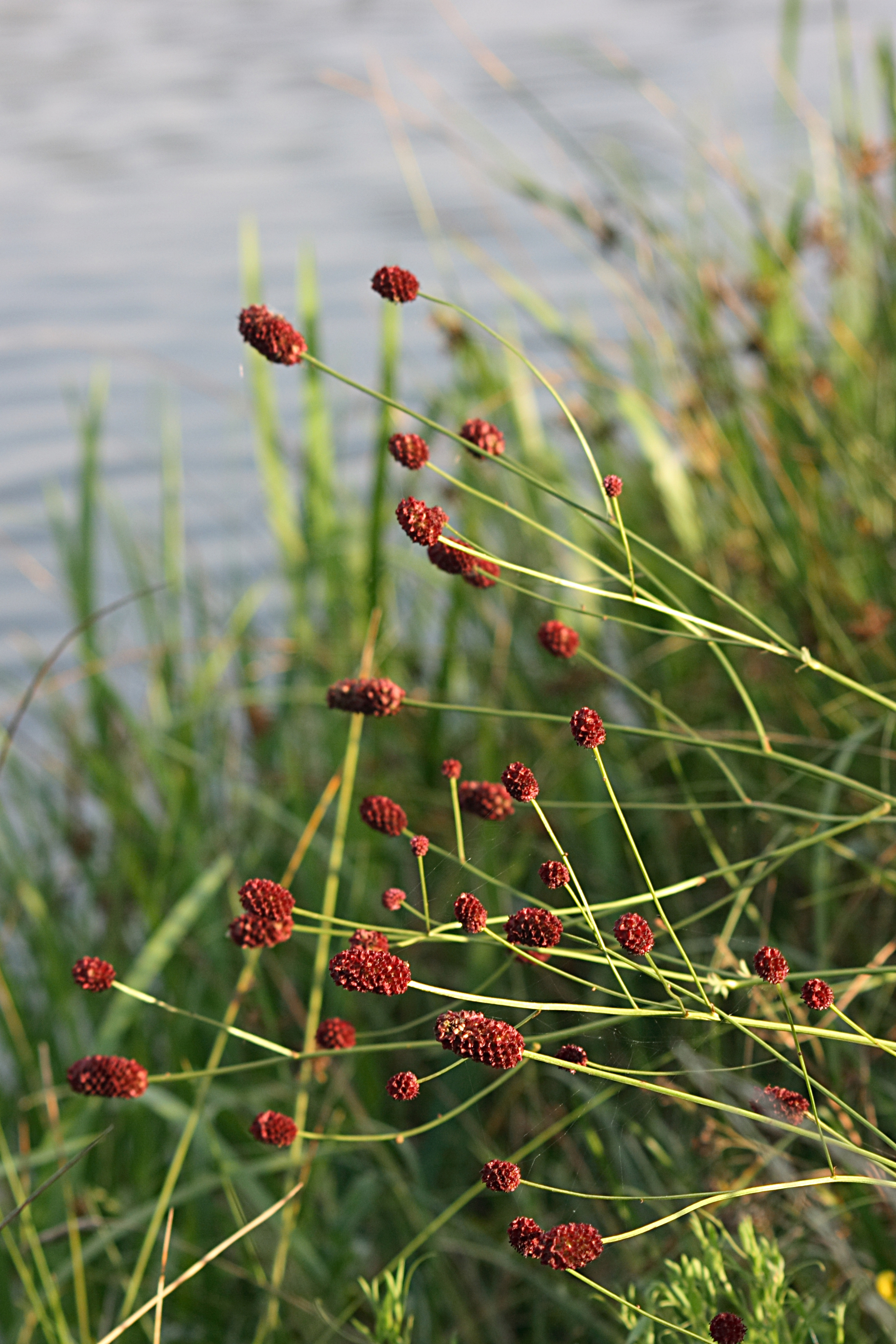 Krvavec toten (Sanguisorba officinalis) který vyhledává vlhká místa. Hostivické rybníky, Praha